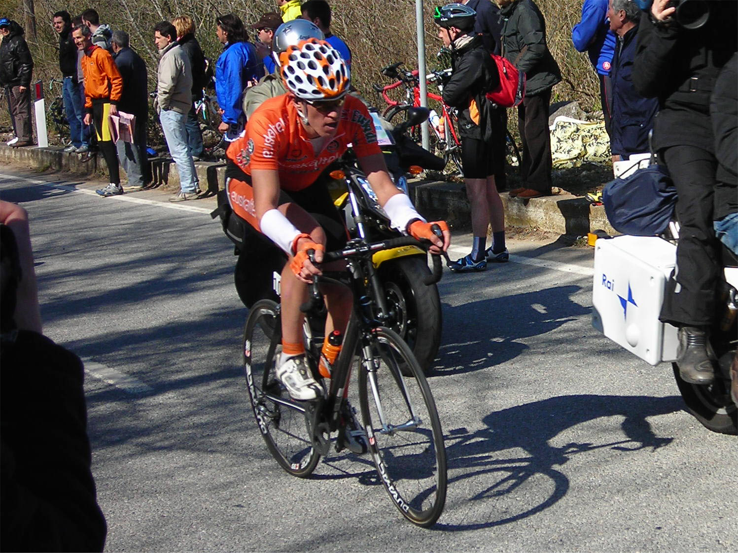 Koldo Fernández sulle Manie alla Milano-Sanremo 2009